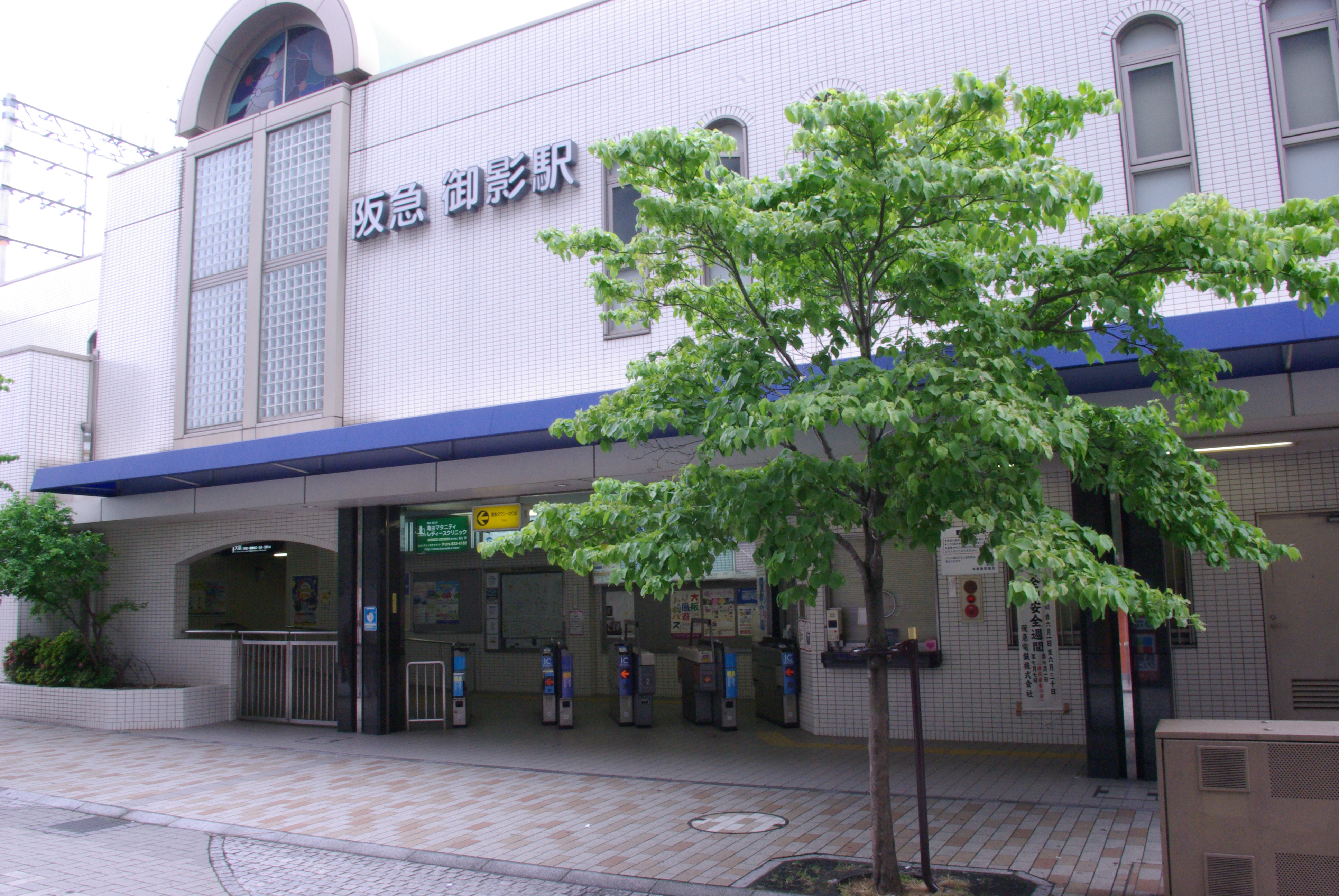 Mikage Station(Mikage, EastNada, Kobe, Hyogo, Japan)